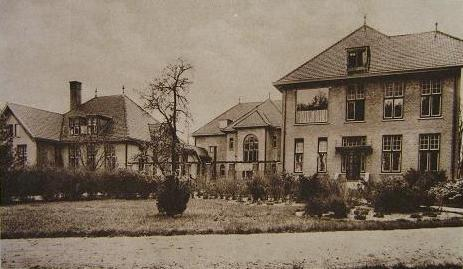 P.W.Janssen Ziekenhuis kort na de ingebruikname